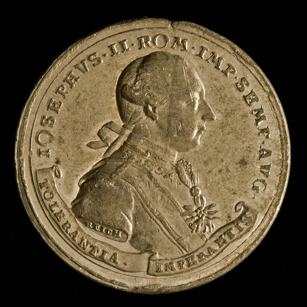 Avers einer Medaille auf das Toleranzpatent Kaiser Josephs II., Fürth 1782. Umschrift: IOSEPHVS II ROM(ANORVM) IMP(ERATOR) SEMP(ER) AVG(VSTVS) – TOLERANTIA IMPERANTIS.